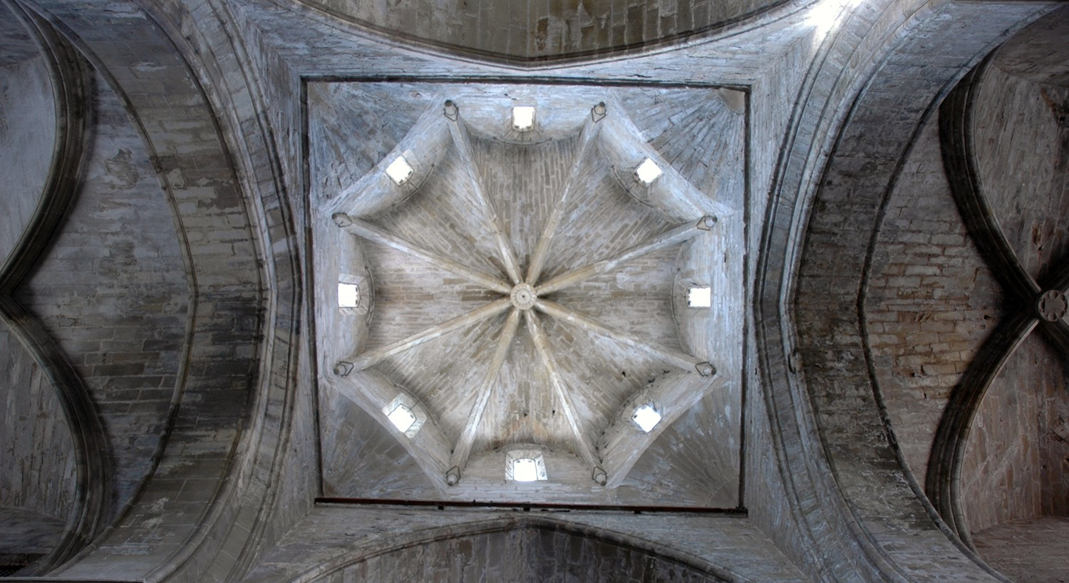 Vallbona de les Monges - Cimbori